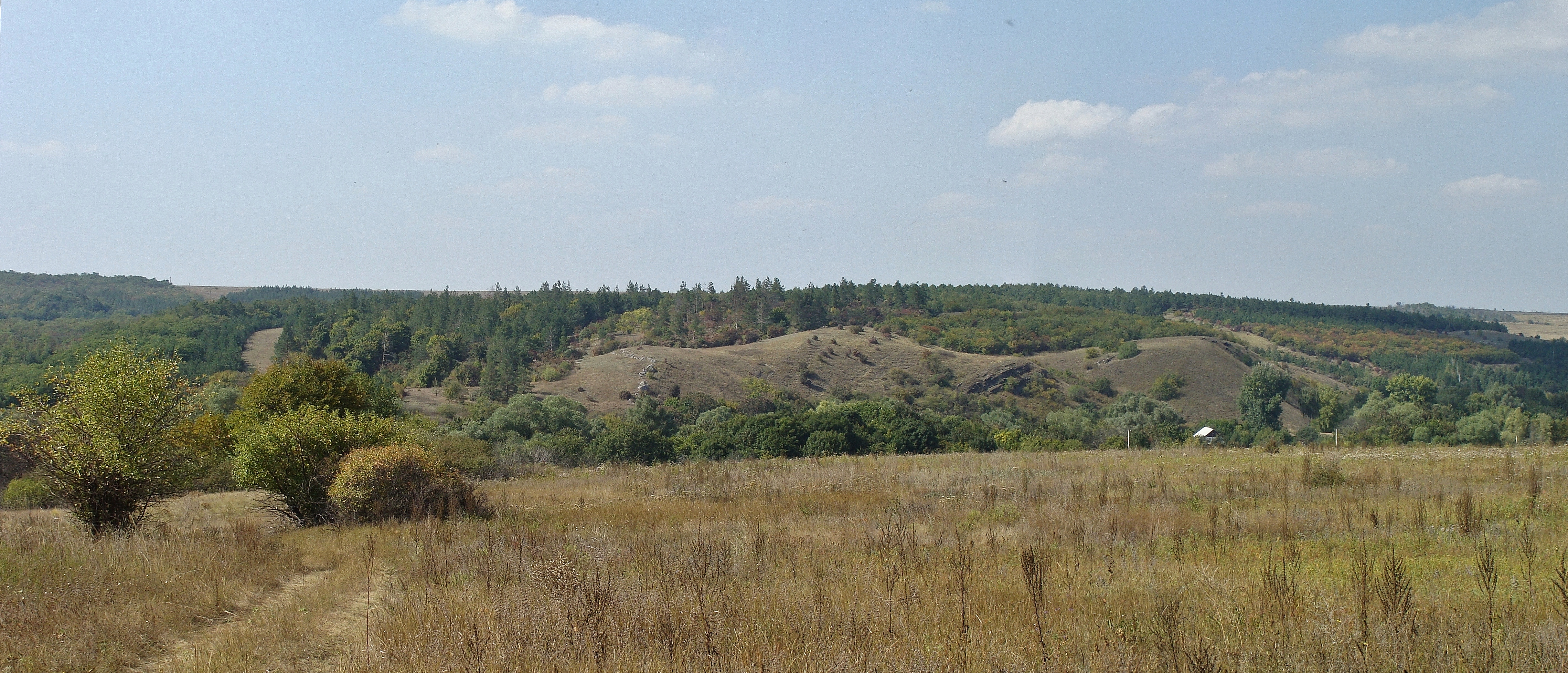 Околиці села Русько-Орлівка